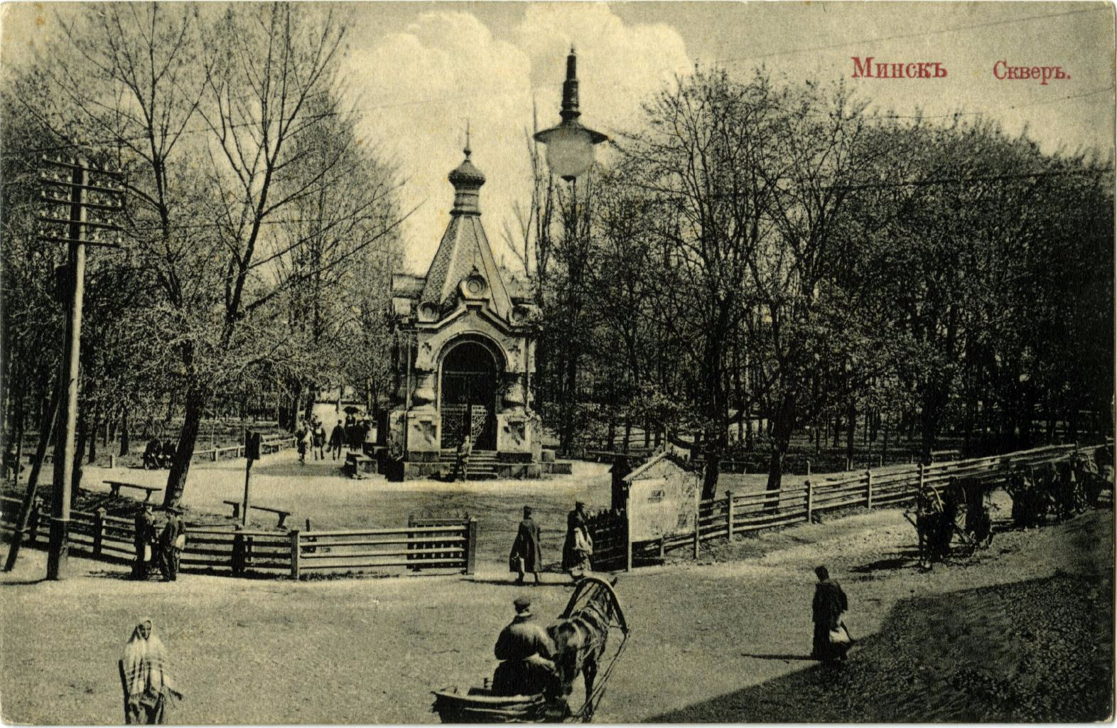 Беларуская (тарашкевіца): Менск (Miensk), Новае Места (Novaje Miesta). Мескі сквэр, капліца